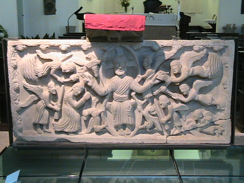 Bardone (Terenzo) - sculture di scuola antelamica